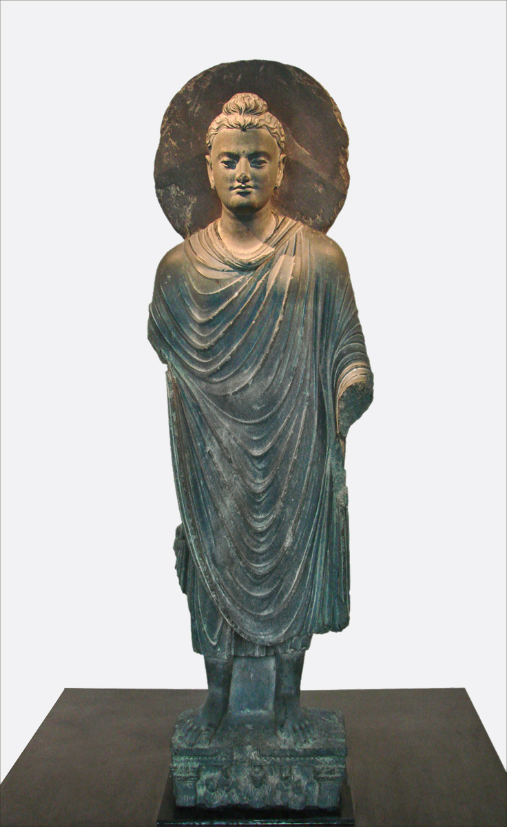 Bouddha debout Gandhara, IIème-IIIème siècle Schiste gris Achat : 2001, avec l'aide du FRAM Musée des arts asiatiques Parc Phoenix, Nice Ce Bouddha Sâkyamuni, taillé dans le schiste, la matière spécifique de la région de l’ancien royaume du Gandhâra (Afghanistan, Pakistan), montre la double influence de l’art hellénique et de l’art indien. Le drapé de la robe monastique s’apparente à celui de l'himation grecque, tandis que les cheveux bouclés, l’allongement des oreilles et le chignon (usnisa) sont des signes distinctifs de l’art bouddhique. EXTRAIT DU SITE OFFICIEL _________ voir d'autres oeuvres d'art du Ghandara présentées au musée d'art oriental de Rome ou au musée Guimet